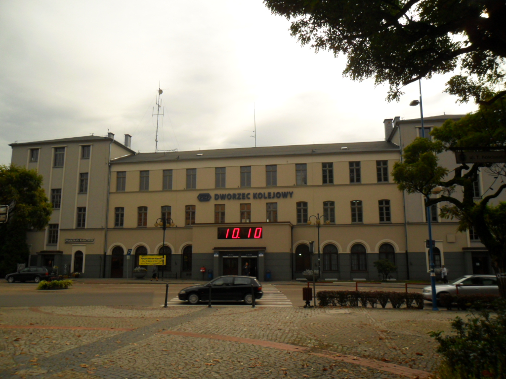 Stacja kolejowa w Rybniku